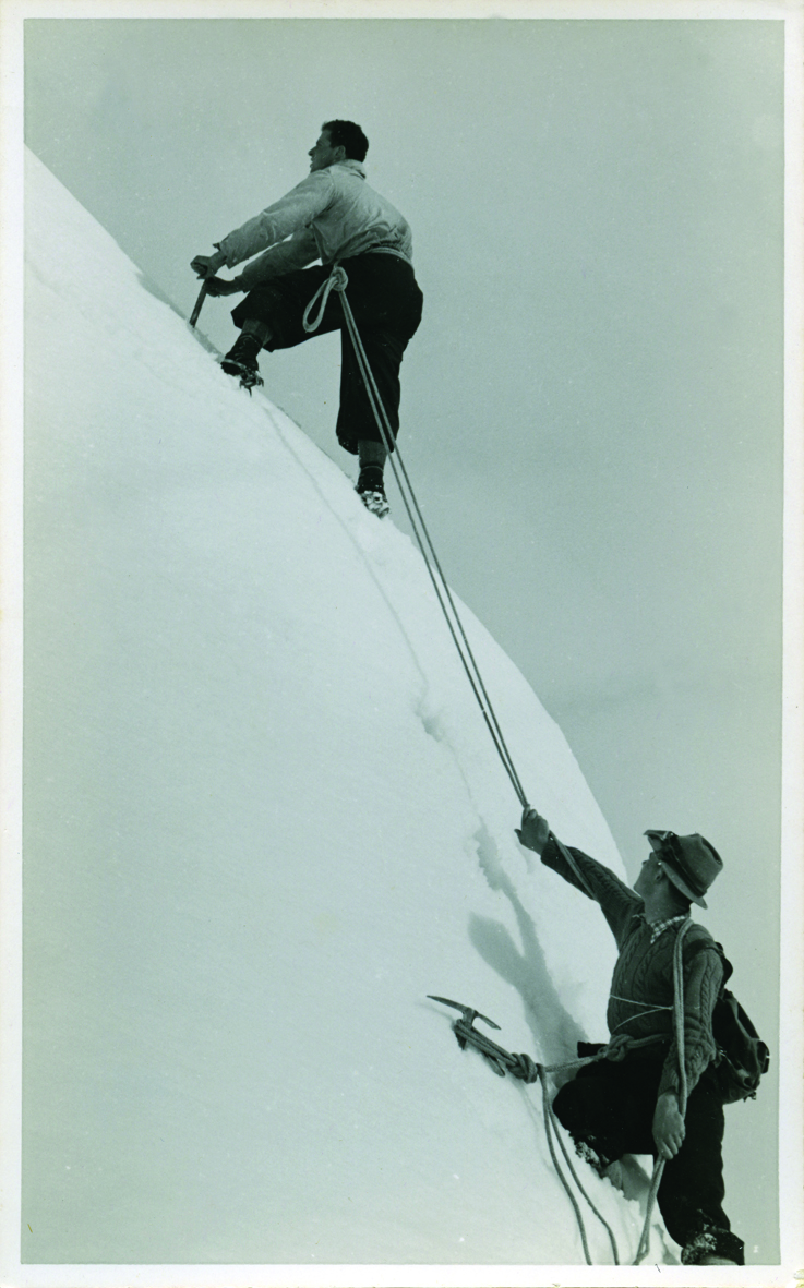 Miha Arih in Uroš Župančič med plezanjem.